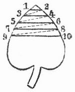 Stickvorlage für die Plattstichstickerei